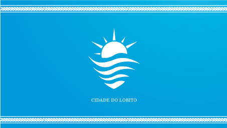 lobito_flag